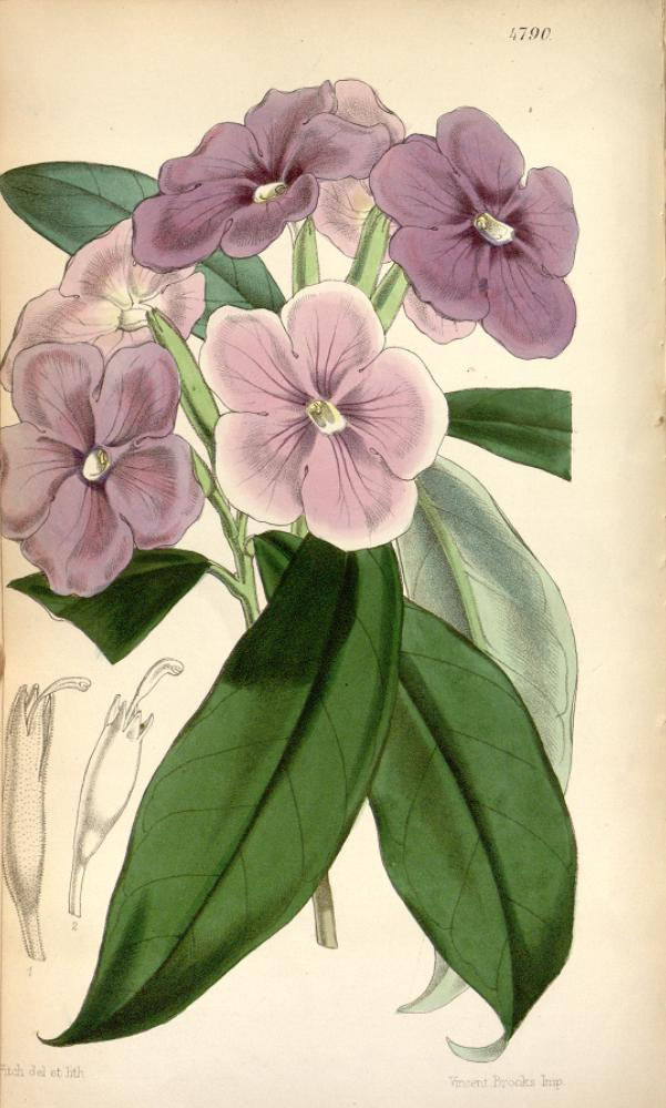 Illustration of Brunfelsia pauciflora (as Franciscea eximia)